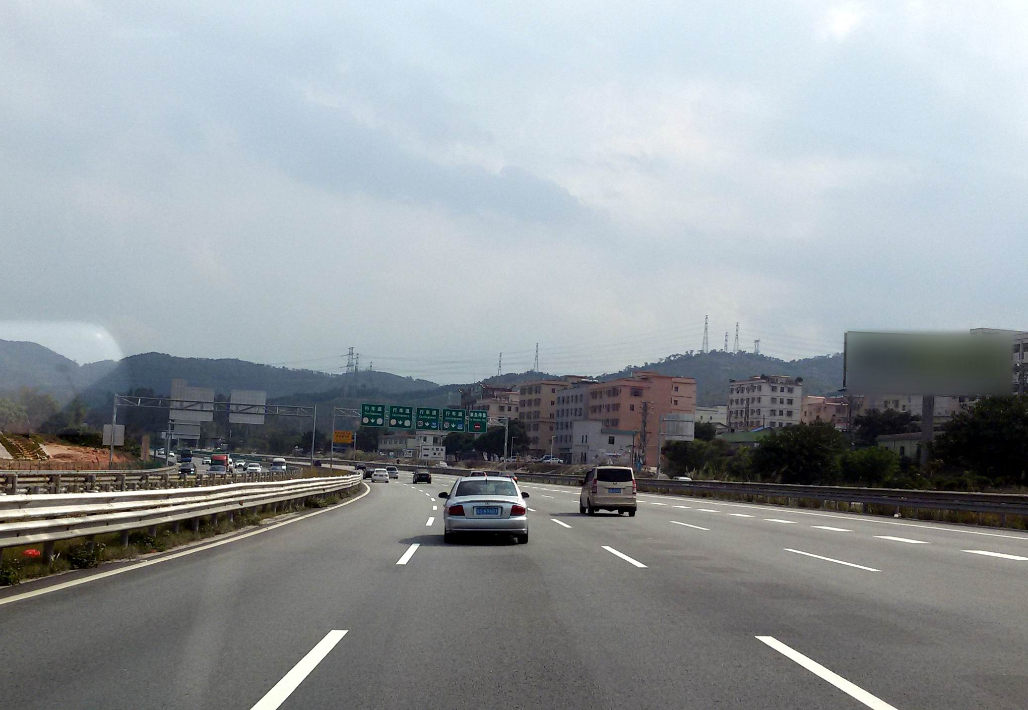 中国高速G4W2 广州方向 狮岭段